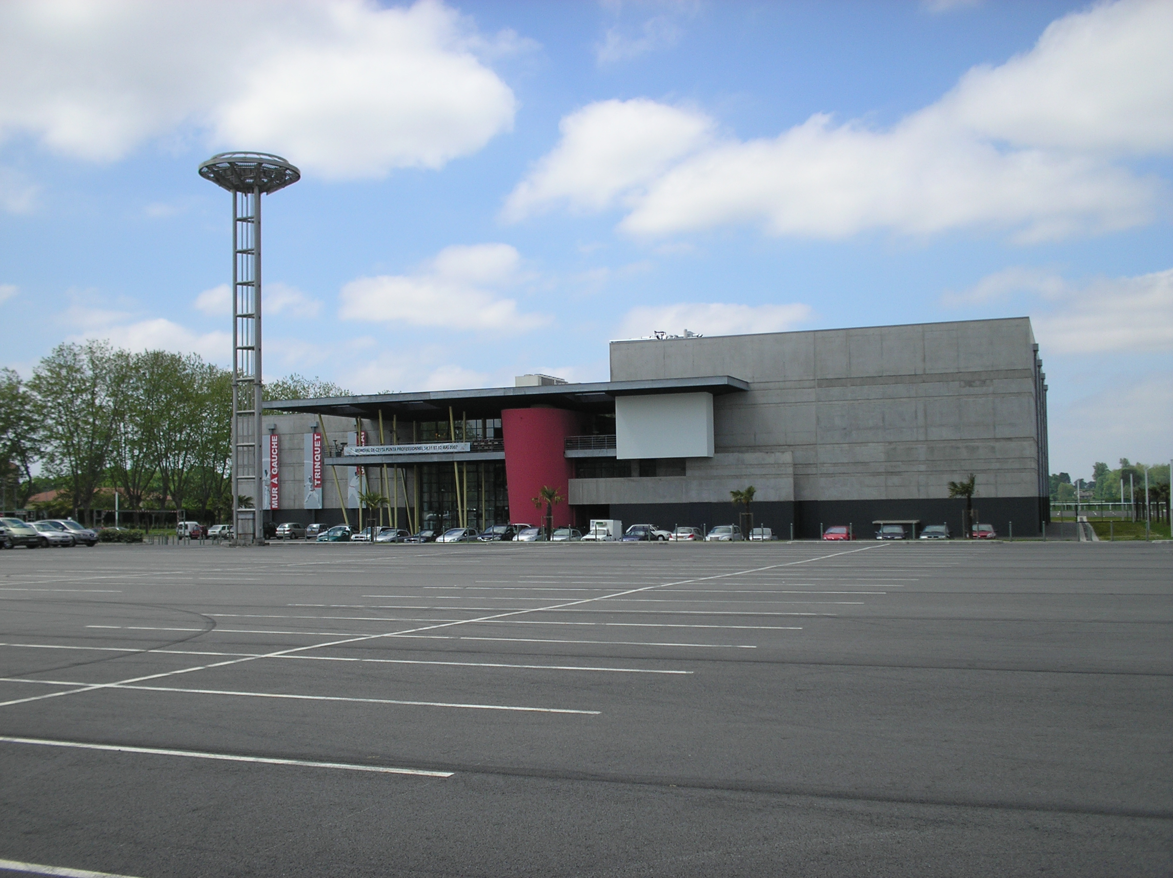 Trinquet de Pau